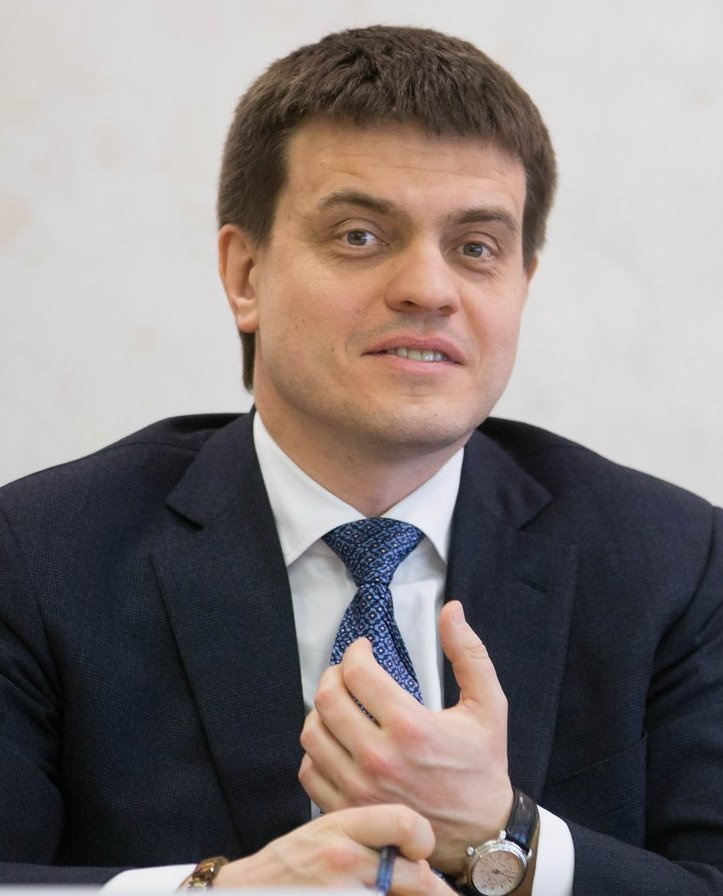 Михаил Михайлович Котюков (род.1976) — российский государственный деятель